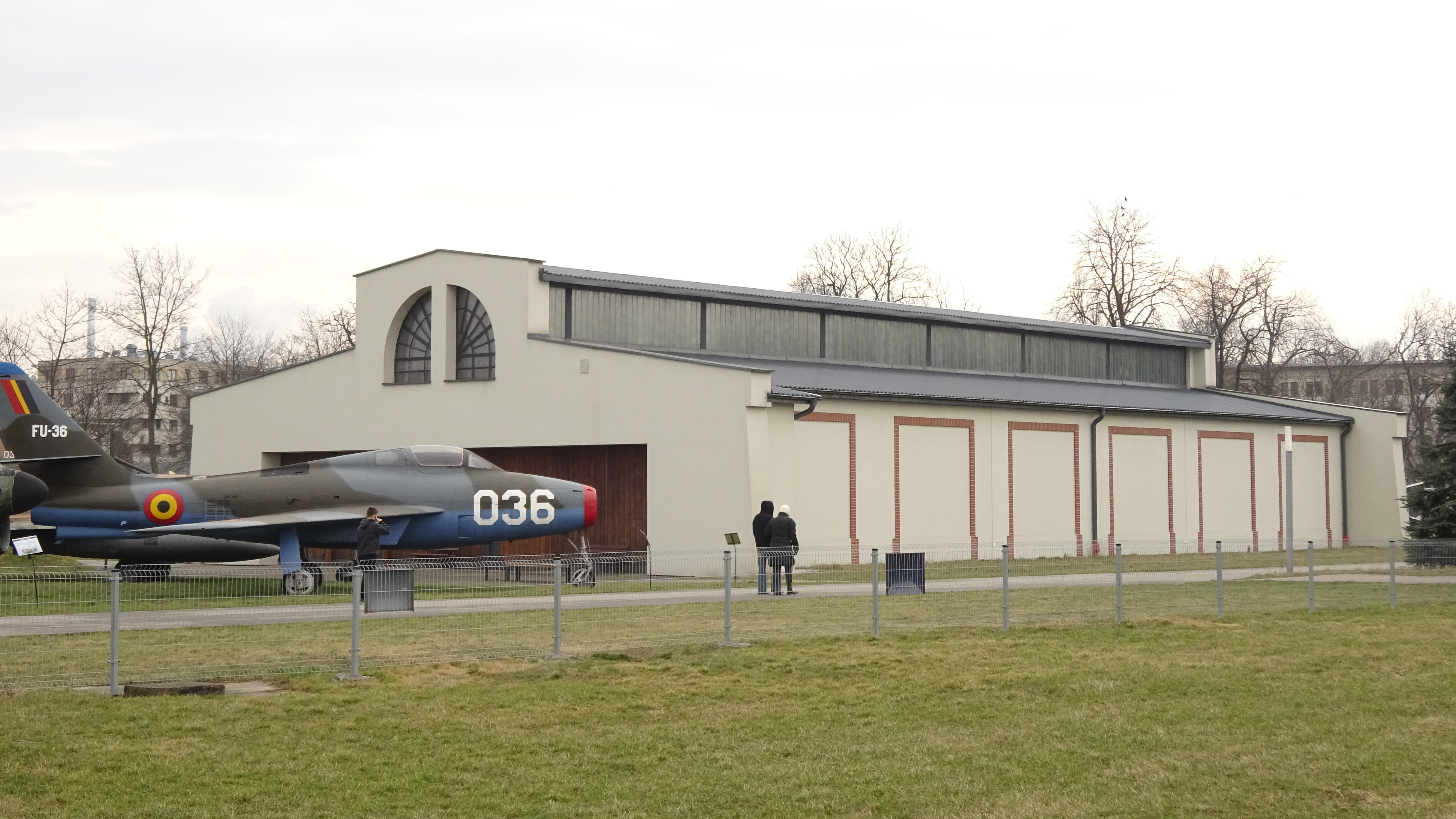 Lotnisko Kraków-Rakowice-Czyżyny. Muzeum Lotnictwa, mały hangar. 2016